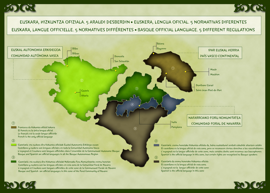 Euskara, hizkuntza ofiziala.